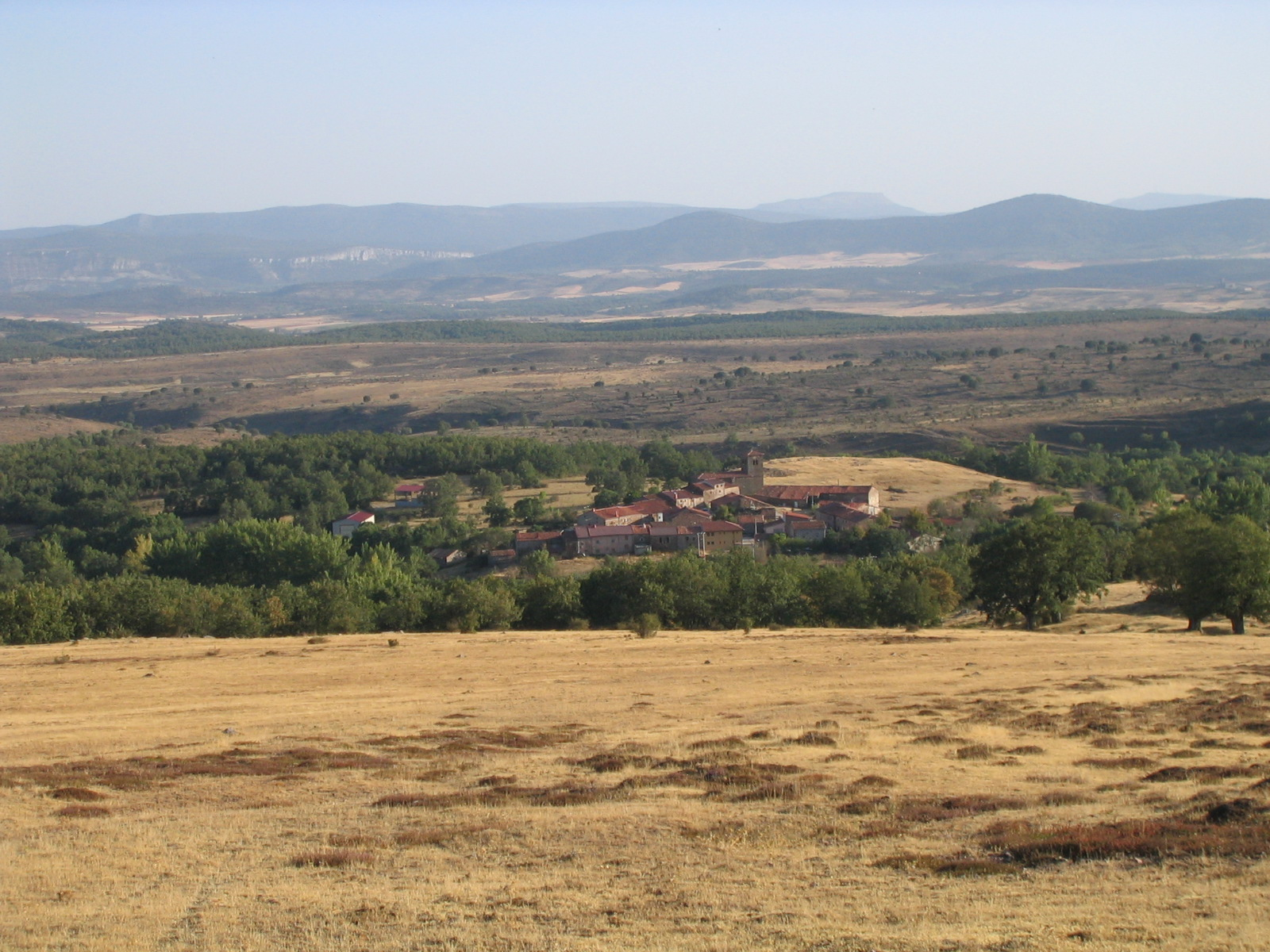 Quintanilla Cabrera view